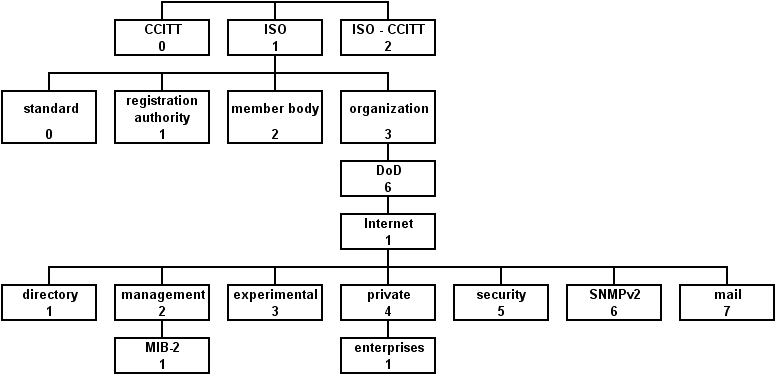 Der Standard-SNMP-MIB-Baum